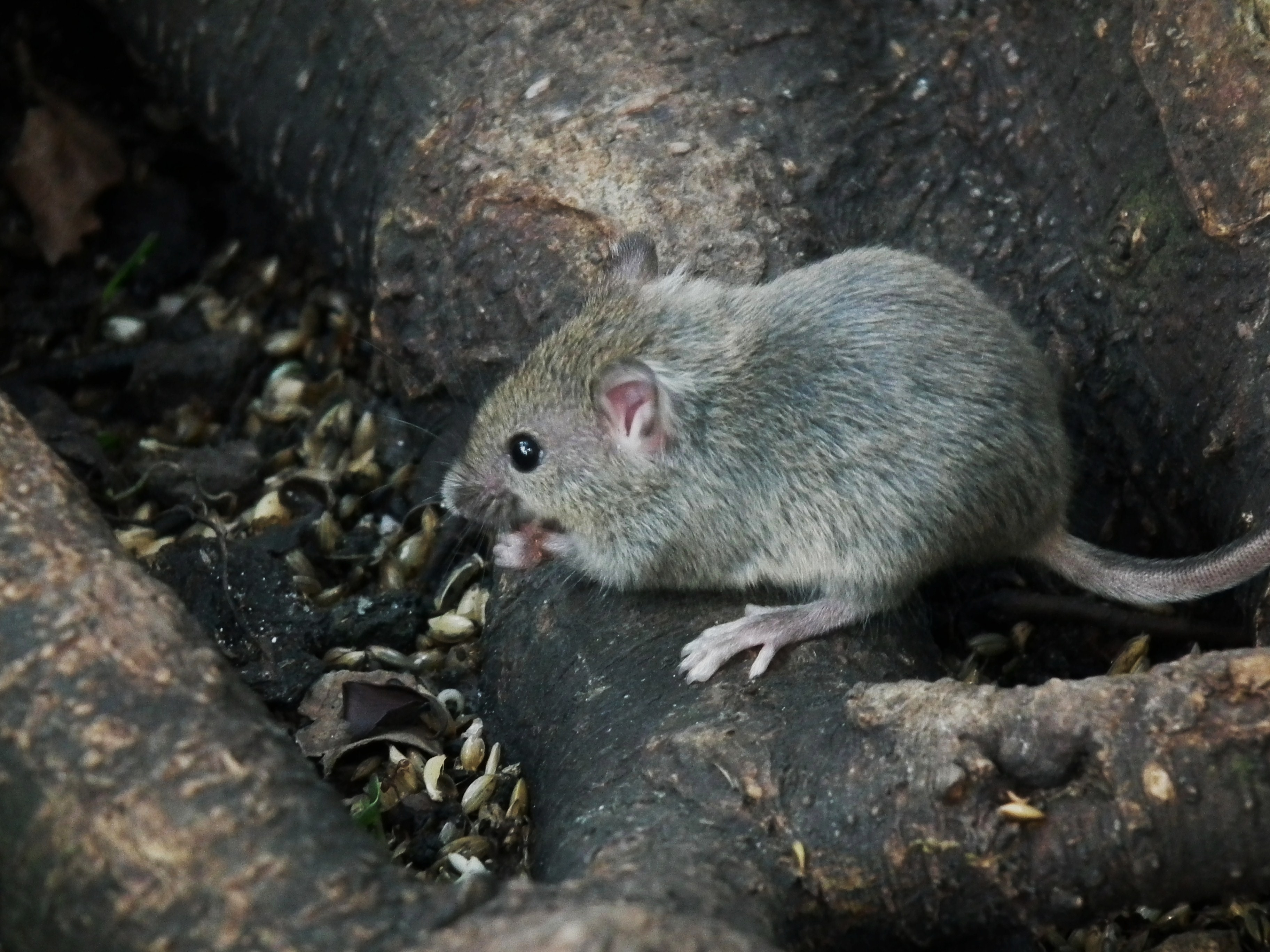 Hausmaus (Mus musculus), fotografiert im nördlichen Baden-Württemberg (Deutschland)